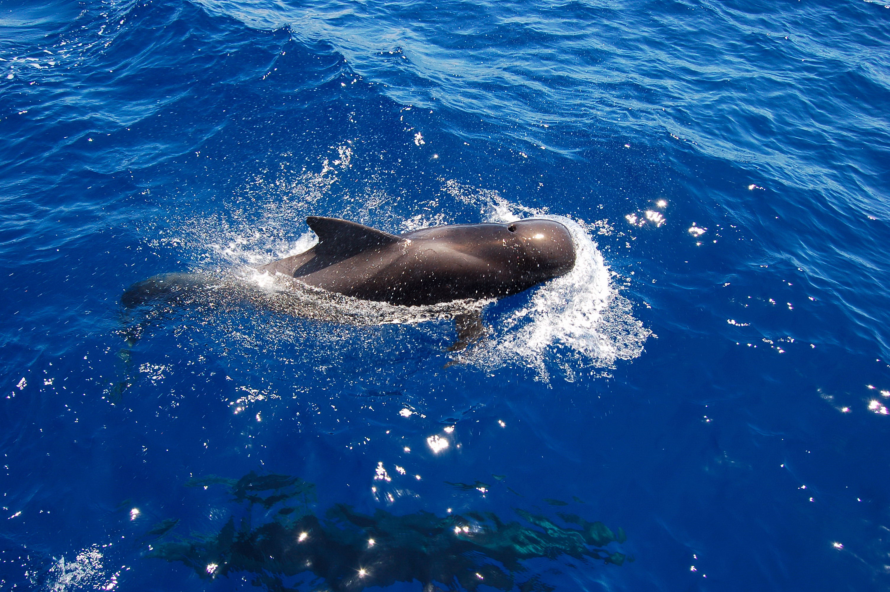 Ballenas en el Sur de Tenerife (spain)